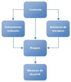 Modules de la méthode EBIOS